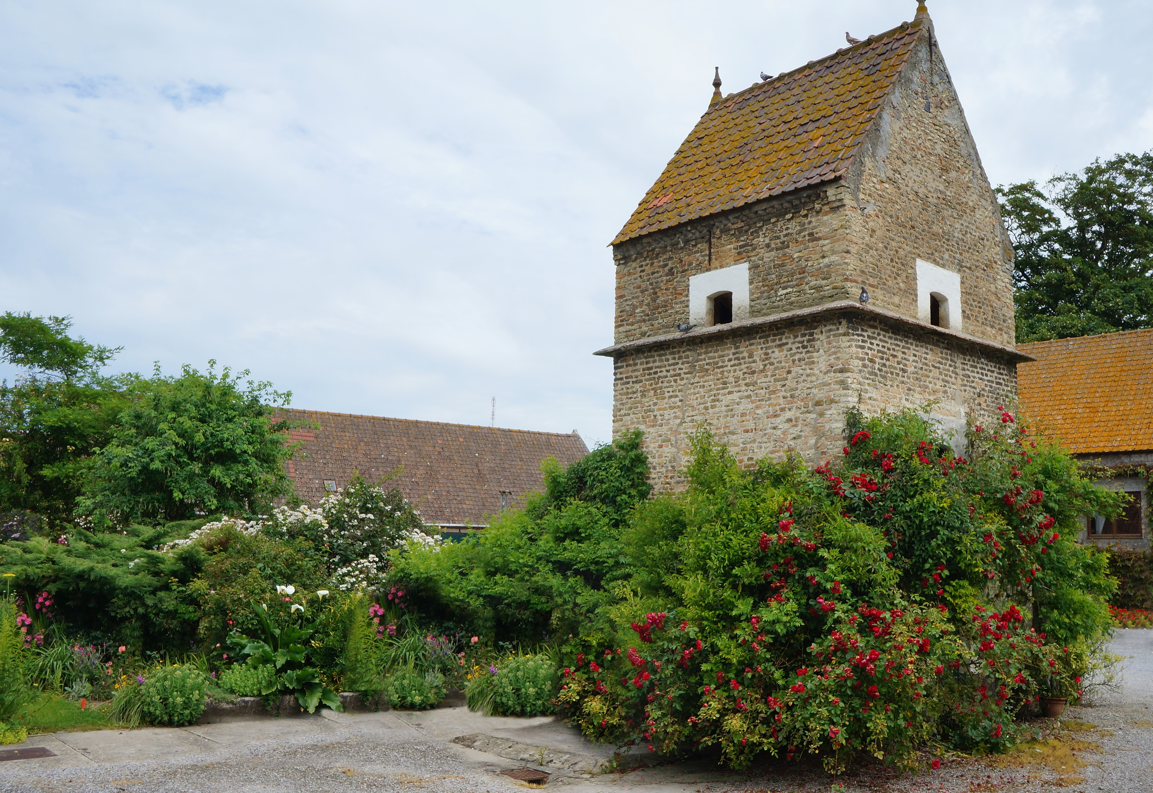 Pigeonnier de la Grand'Maison, Hameau de la Haute-Escalles.